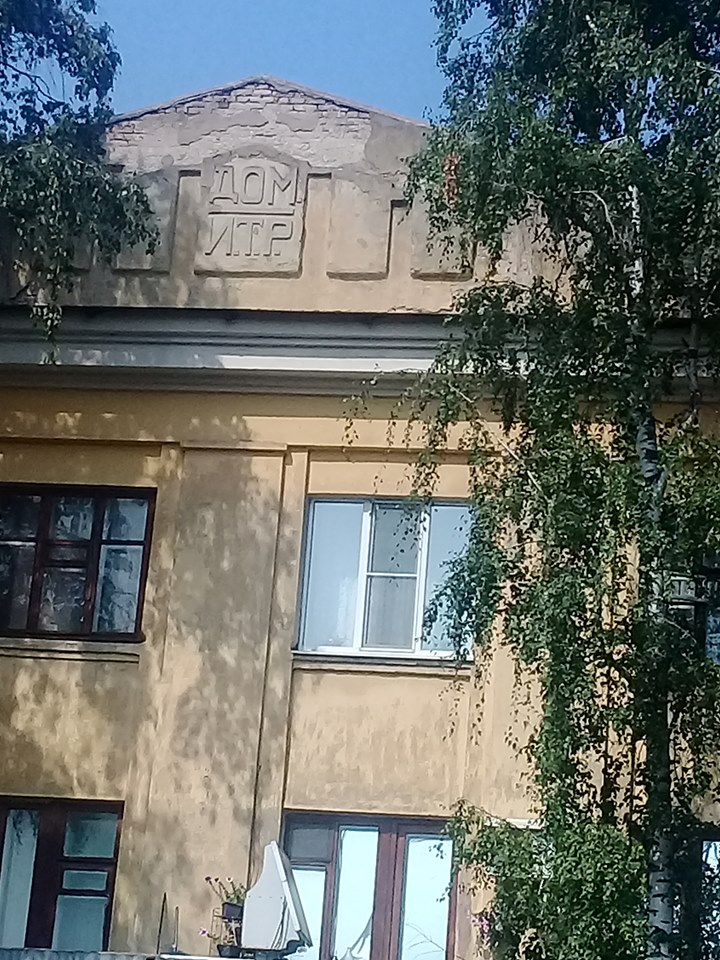 Жилой дом. Дом ИТР, 1934 года постройки